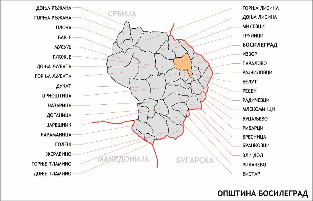 Carte de la municipalité de Bosilegrad en Serbie, indiquant l'emplacement de chaque localité